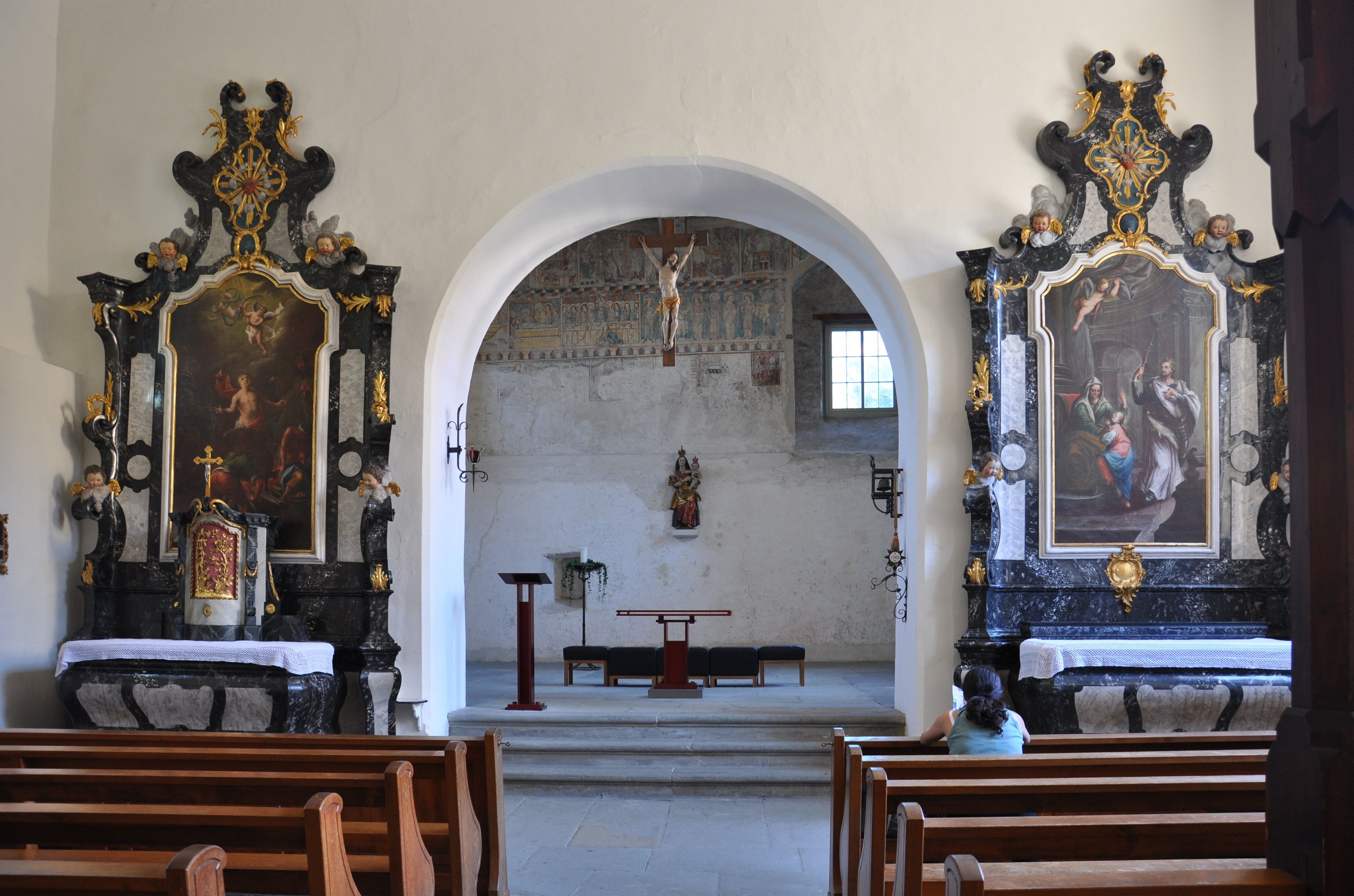 Bregenz, Inneres der Martinskapelle